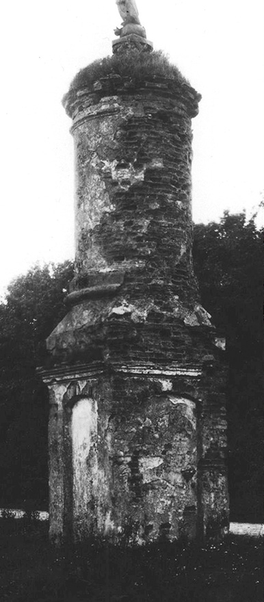 Беларуская (тарашкевіца): Вістычы (Vistyčy). Касьцёл Сьвятой Соф'і і кляштар цыстэрыянаў